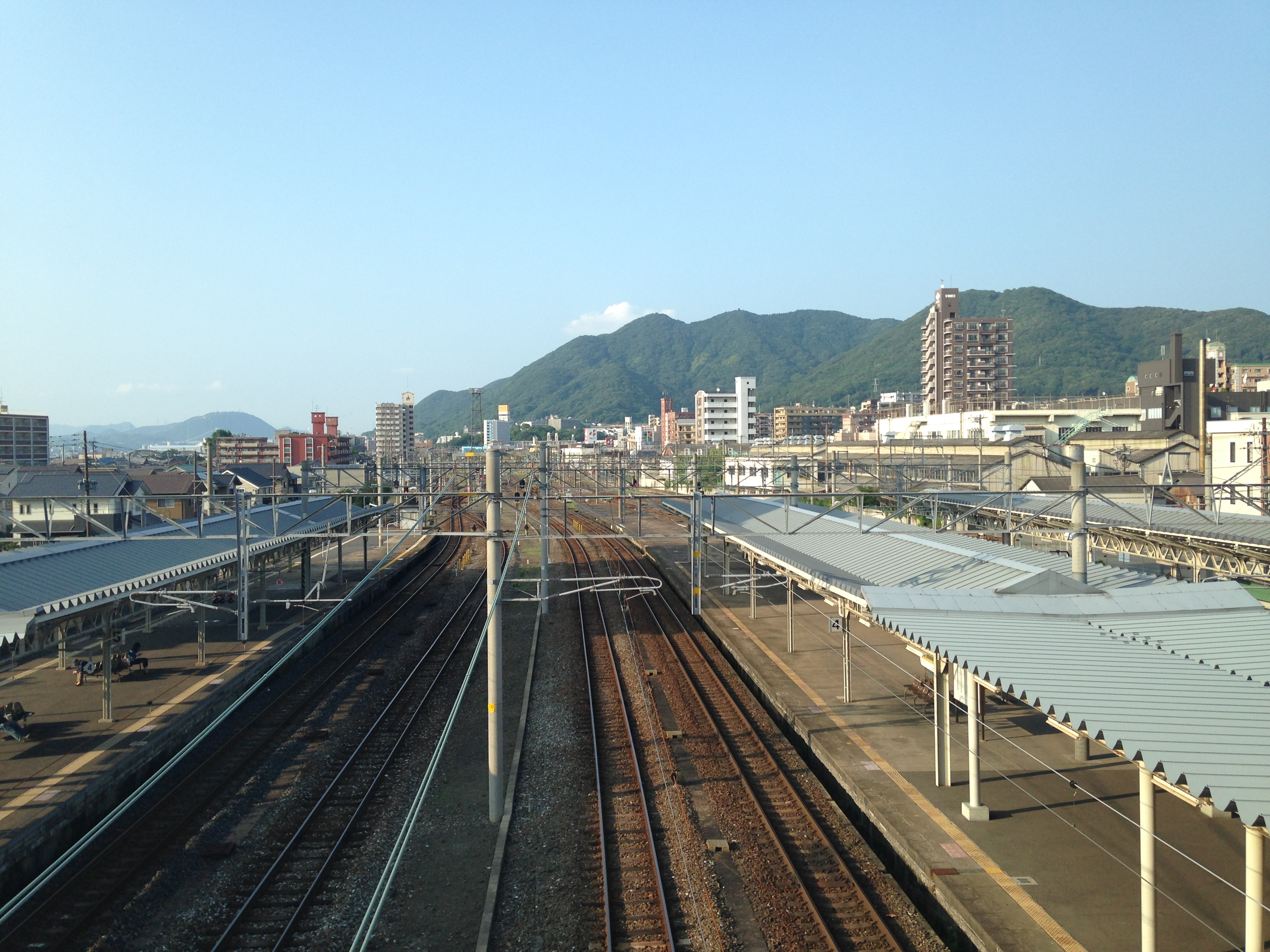 門司駅の跨線橋より望む鹿児島本線(小森江方面)・山陽本線(下関方面)